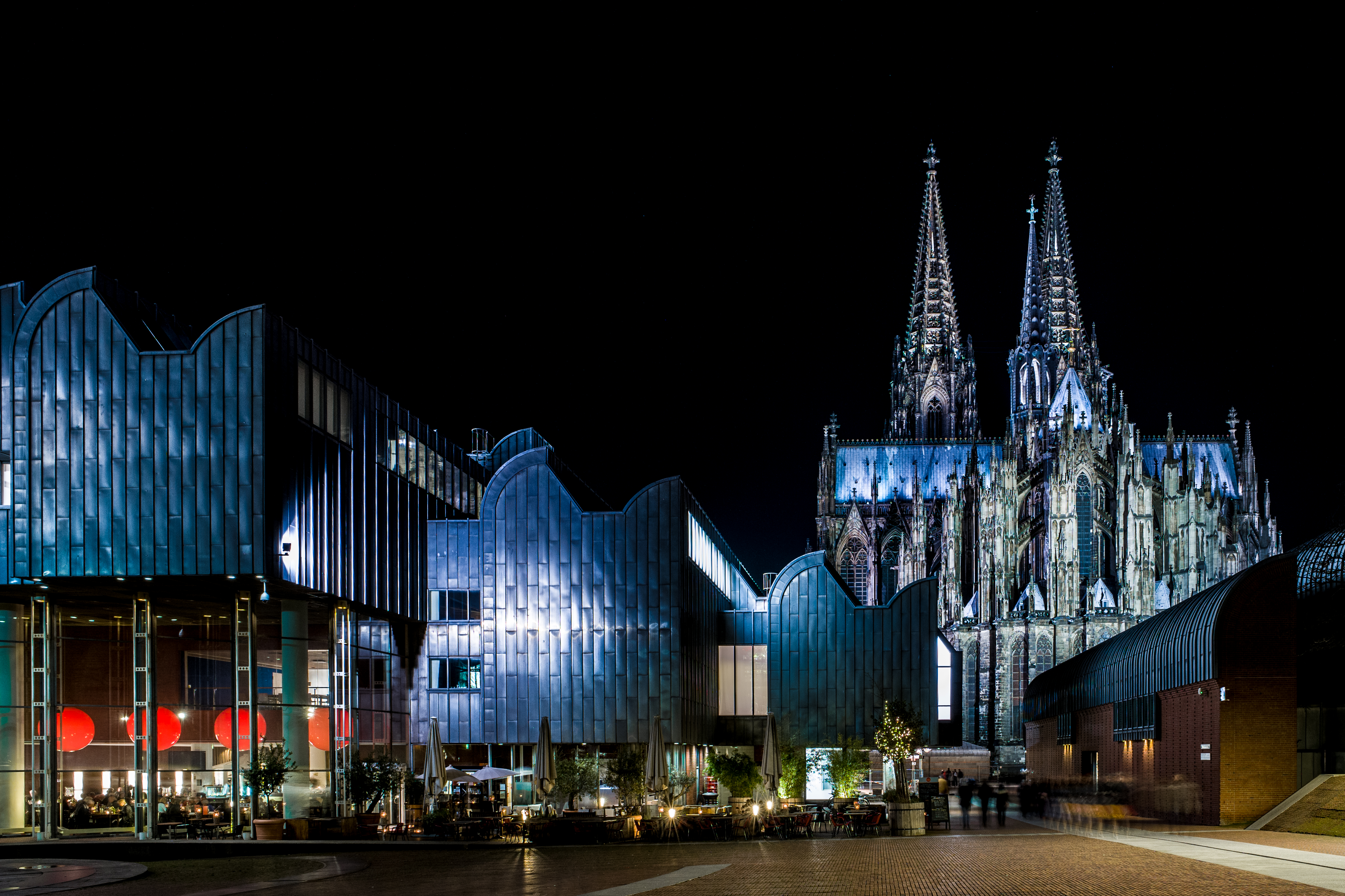 Kölner Dom, Köln.This is a photograph of an architectural monument.